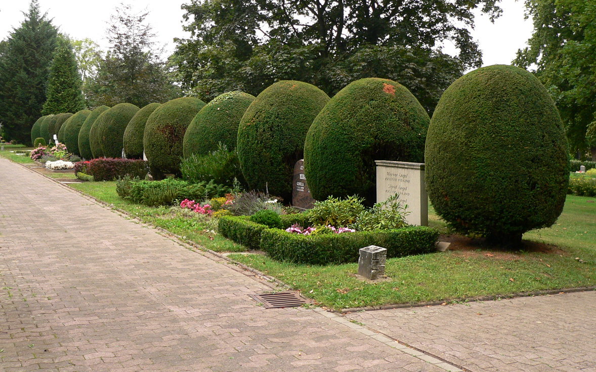 Stadtteilfriedhof Ahlem, Gräberreihe mit Rundbüschen